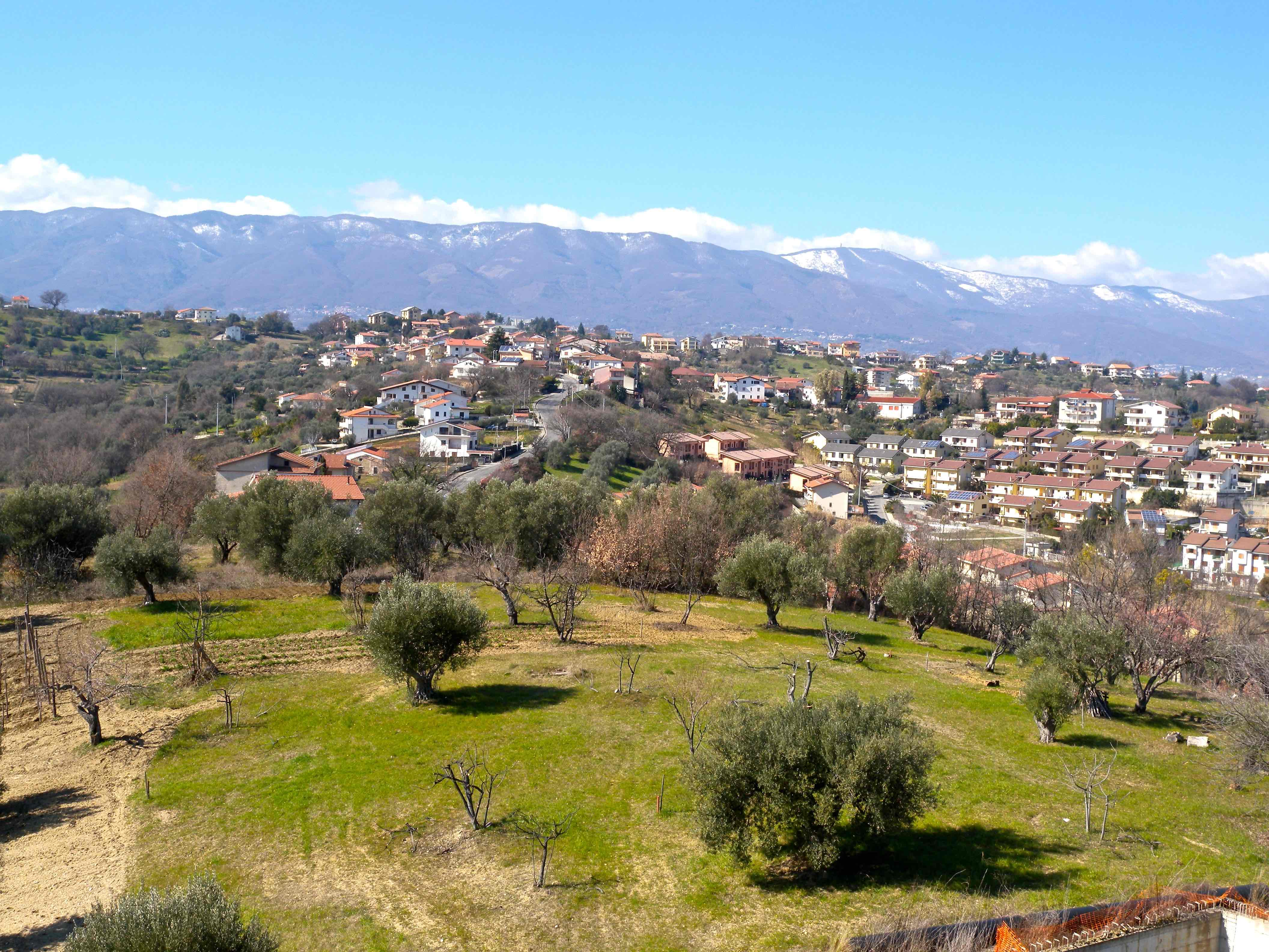 Arcavacata, frazione di Rende, panorama.